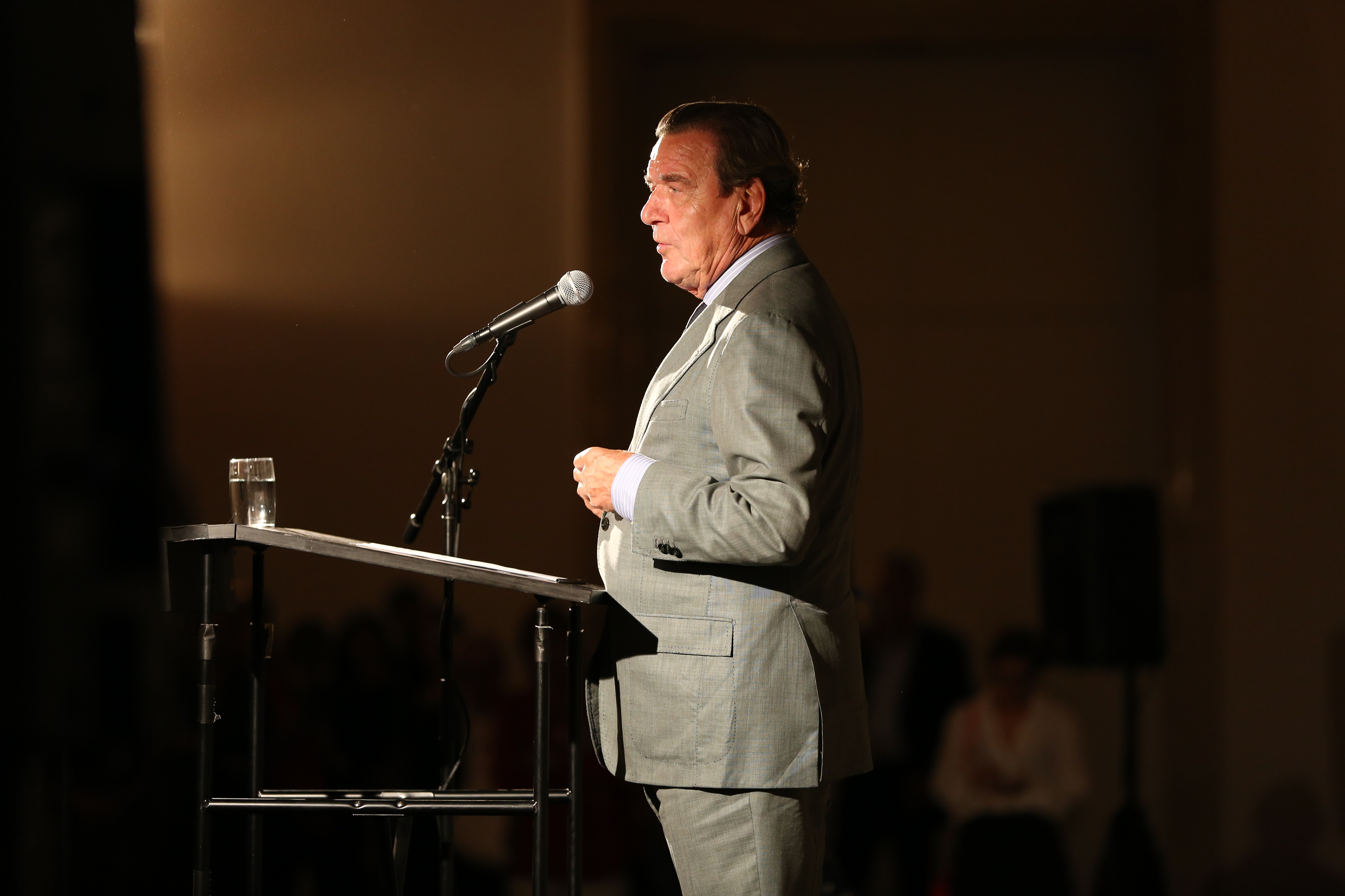 Gerhard Schröder bei der Vernissage der Immendorff-Retrospektive im Haus der Kunst, München, 2018-09-13